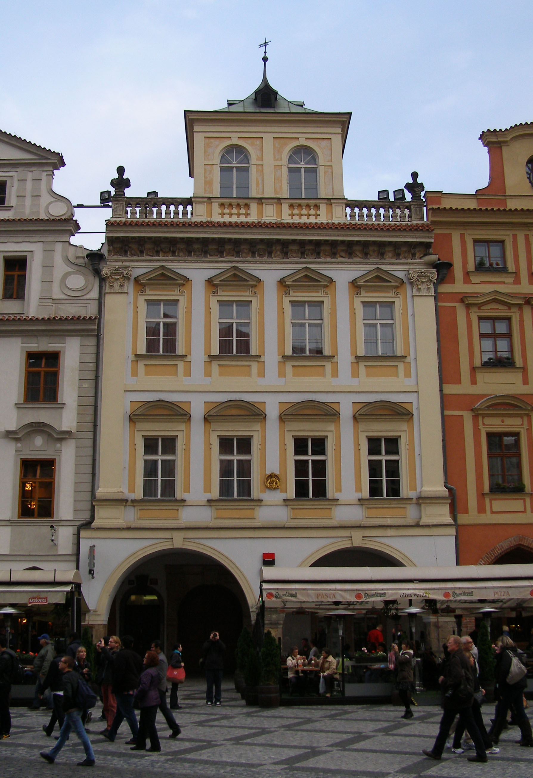 Měšťanský dům U červené lišky (Staré Město), Praha 1, Kožná, Staroměstské nám. 480/9, Staré Město